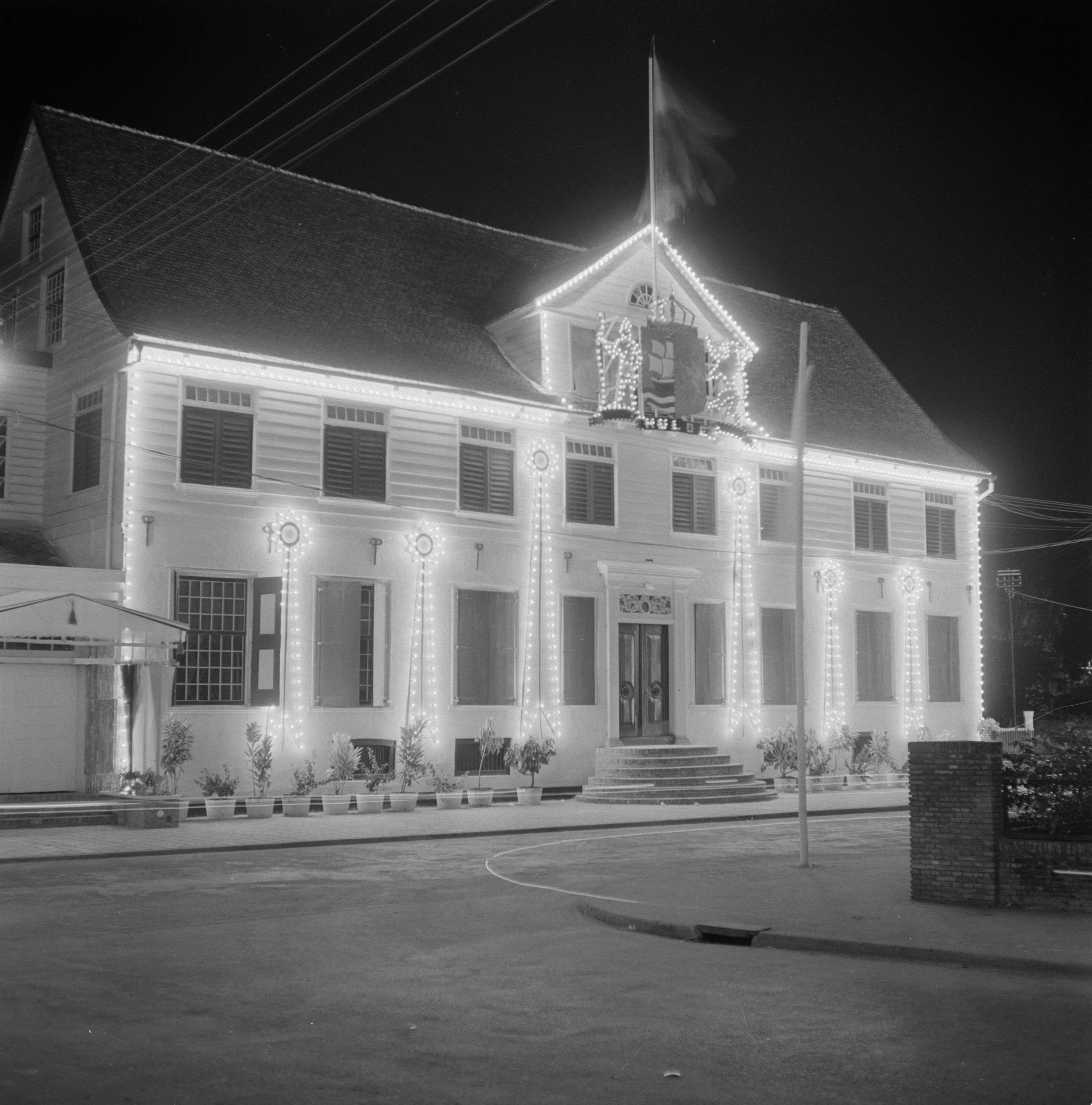 Collectie / Archief : Fotocollectie Van de Poll Reportage / Serie : Nederlandse Antillen en Suriname ten tijde van het koninklijk bezoek van koningin Juliana en prins Bernhard in 1955 Beschrijving : Illuminatie van het Gebouw der Staten in Paramaribo Datum : 27 oktober 1955 Locatie : Paramaribo, Suriname Trefwoorden : gebouwen, nachtopnames, versieringen Fotograaf : Poll, Willem van de Auteursrechthebbende : Nationaal Archief Materiaalsoort : Negatief (zwart/wit) Nummer archiefinventaris : bekijk toegang 2.24.14.02 Bestanddeelnummer : 252-4737